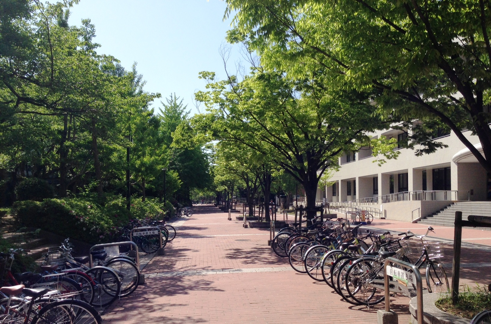 大阪大学豊中キャンパス構内通り